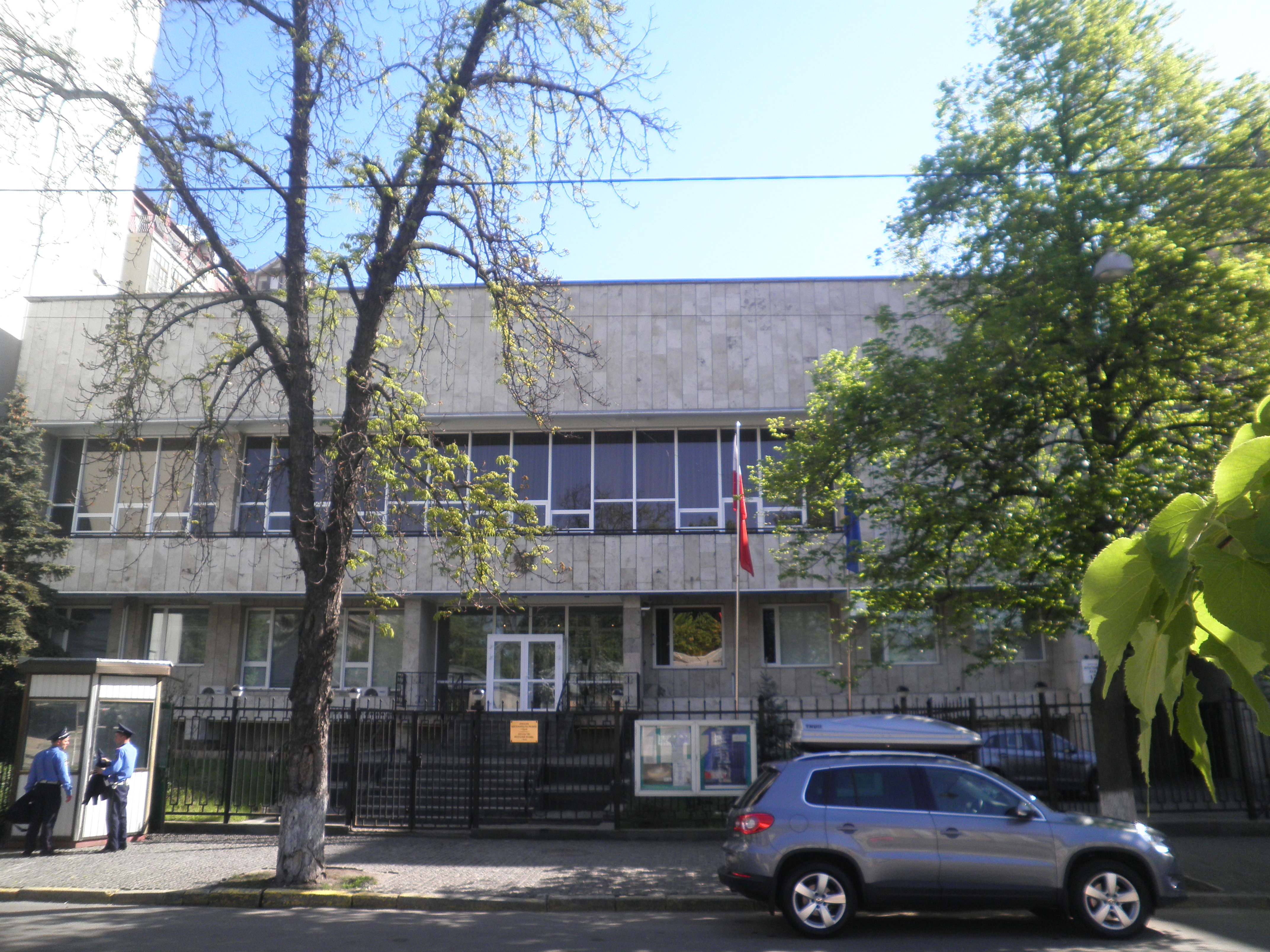 Посольство Польщі в Києві